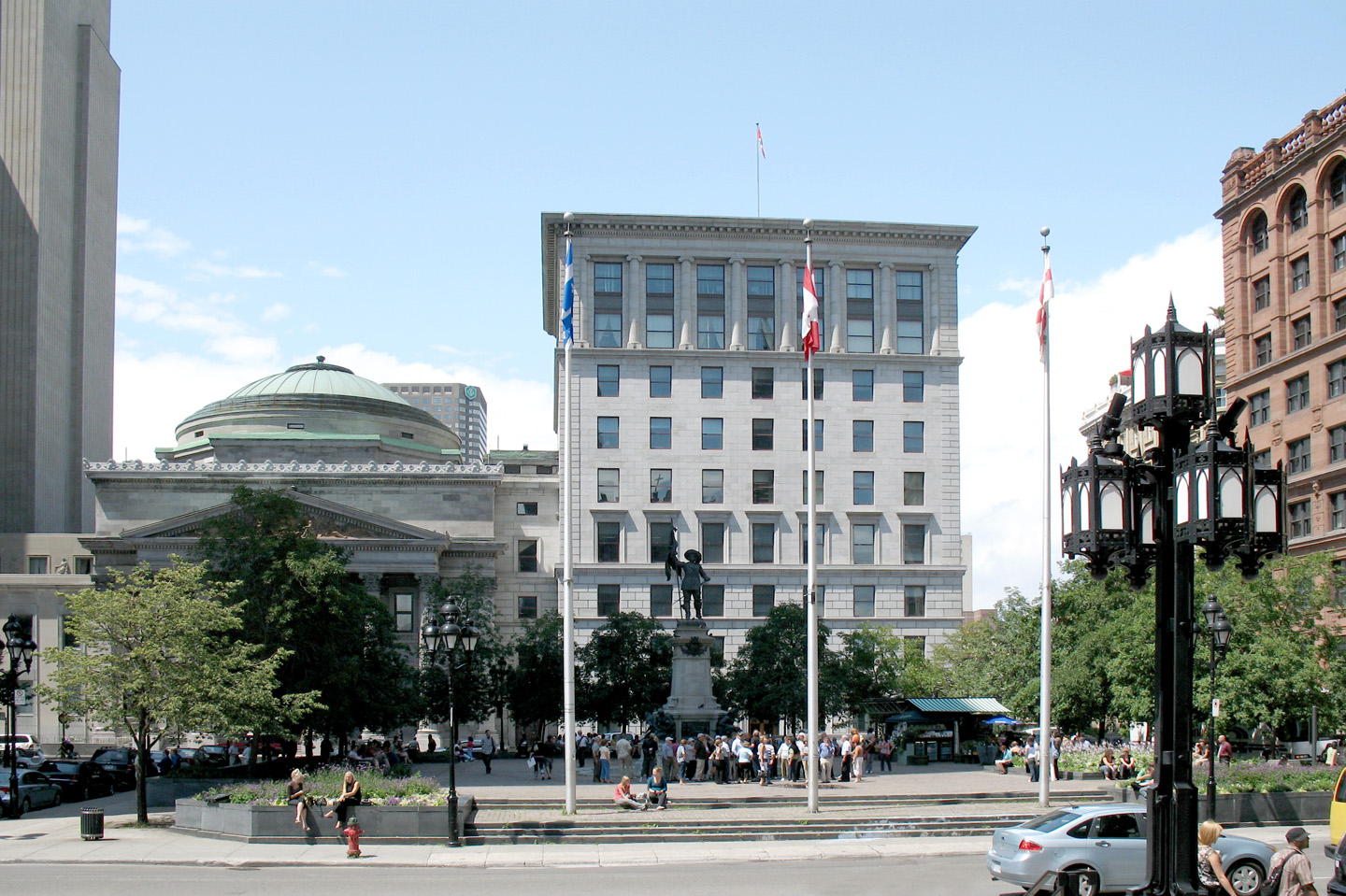 Place d'Armes, Montréal, Canada. La Place d’Armes, au centre duquel se trouve le monument d’un des fondateurs de la ville – Maisonneuve – est un lieu historique important.